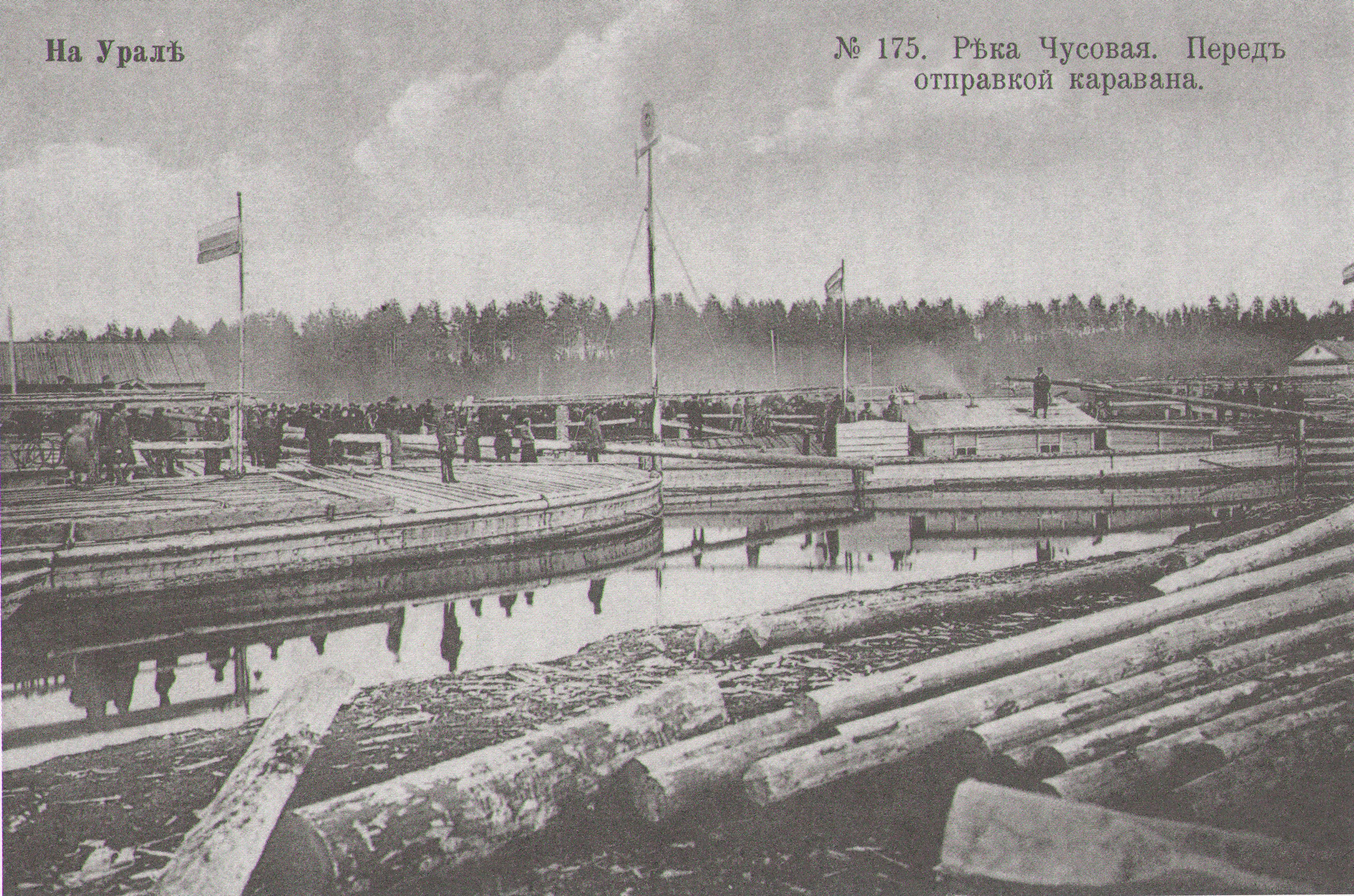 Метенков В.Л. Отправка каравана, 1893